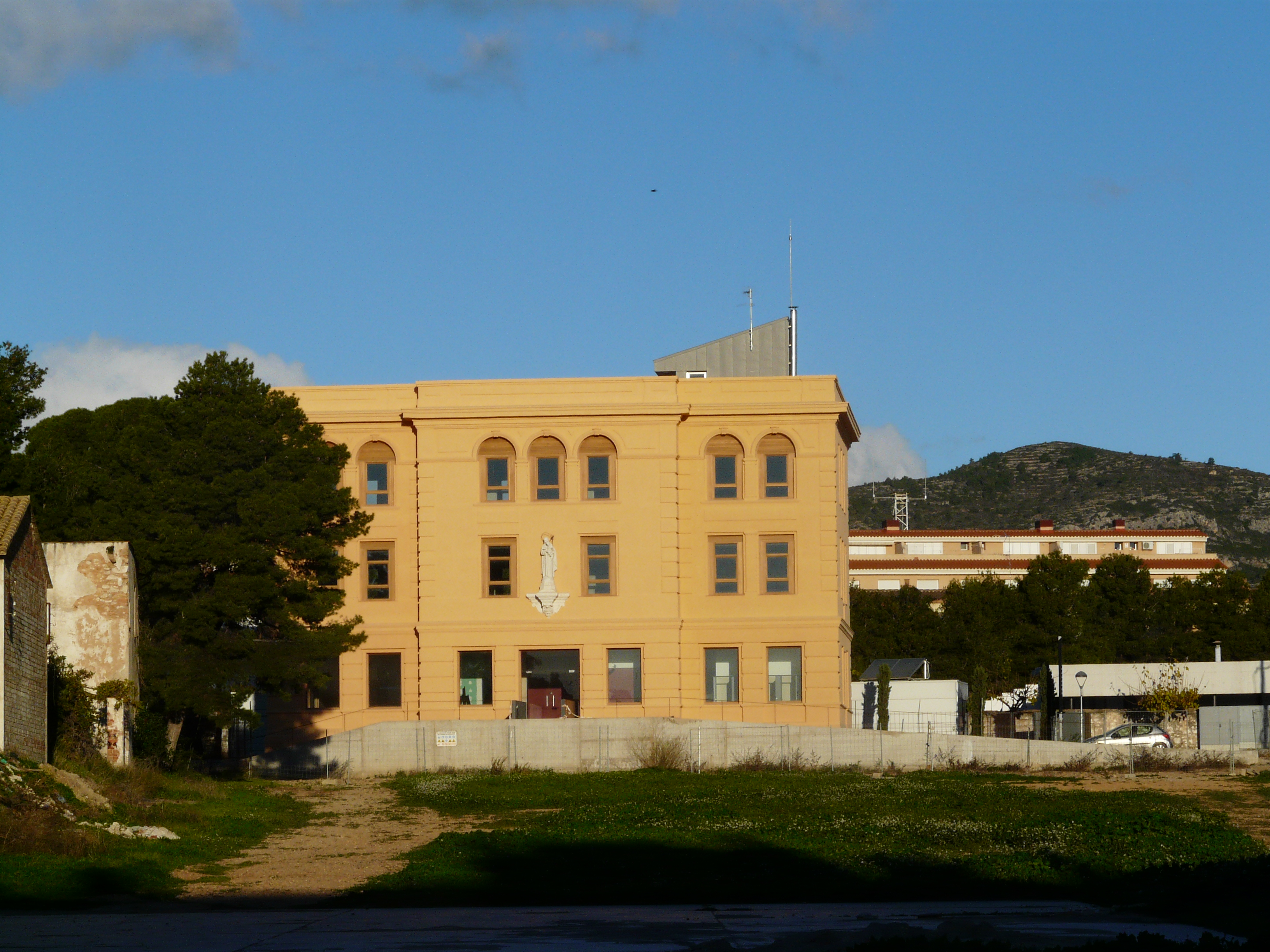 Edifici dels Josepets, Convent dels Josepets. Antiga ctra. de les Cases, les Cases d'Alcanar (Alcanar). Object location40° 33′ 12.88″ N, 0° 31′ 36.46″ E